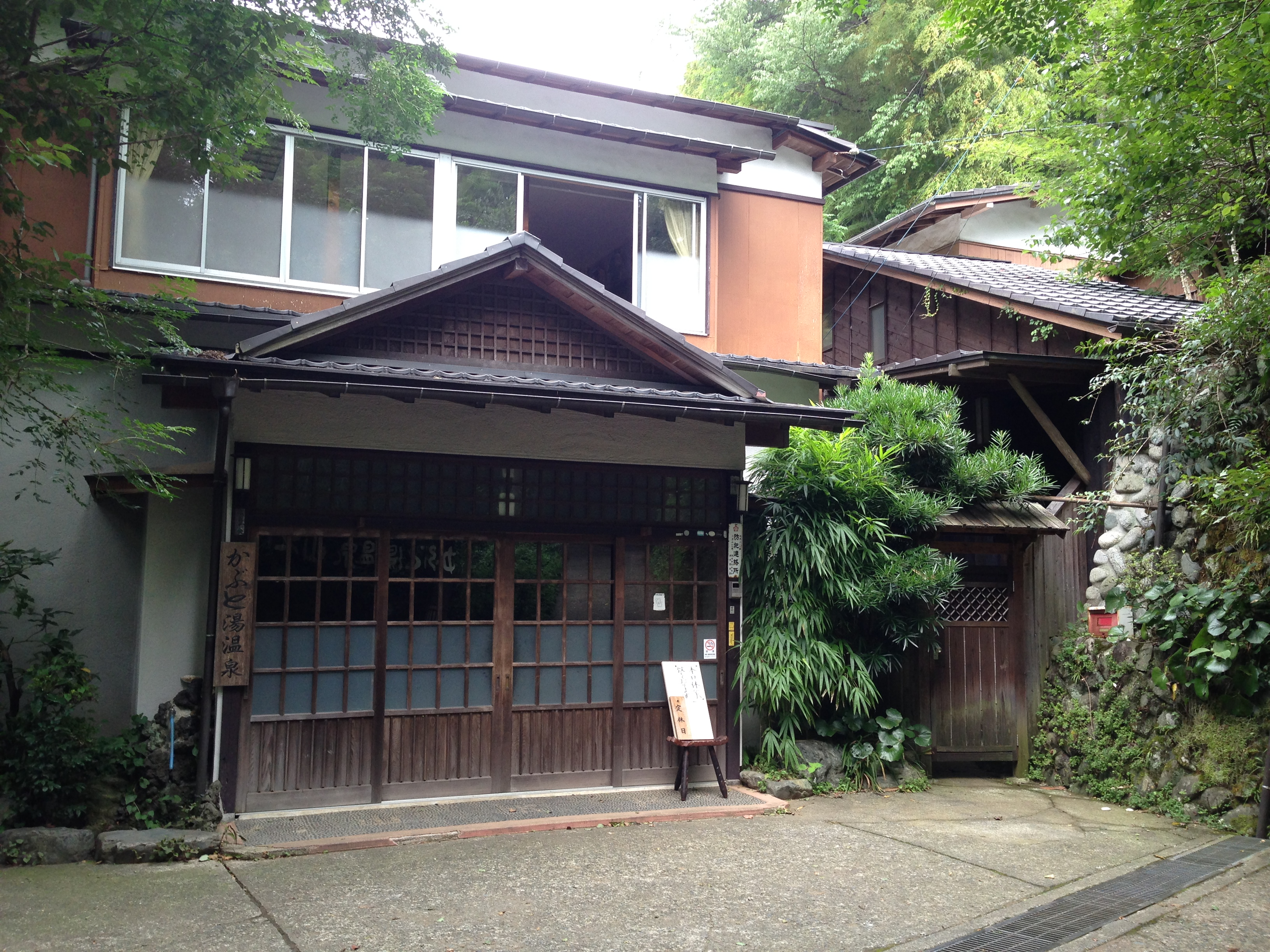 かぶと湯温泉「山水楼」の外観。